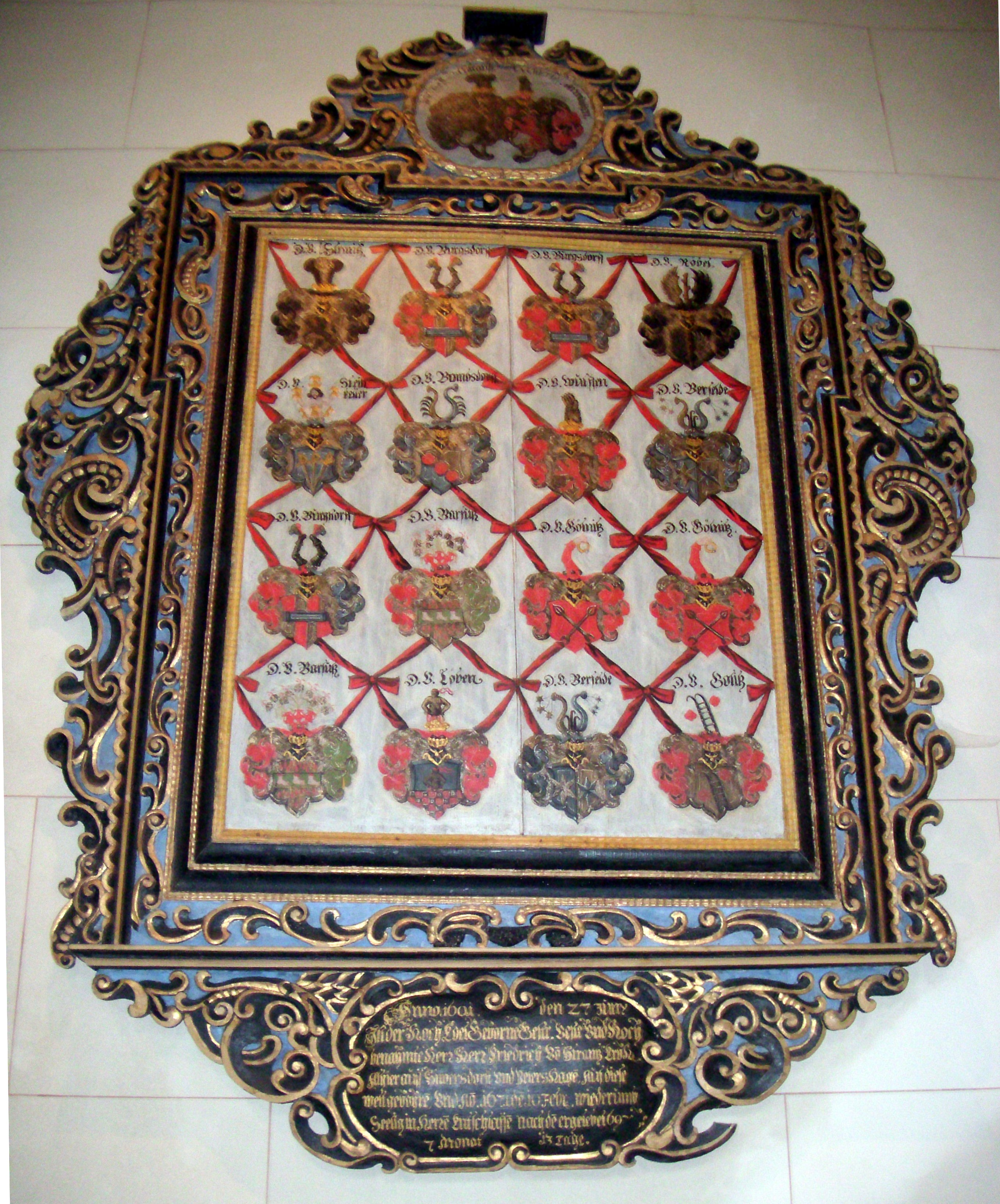 Wappenepitaph mit der Ahnentafel des Friedrich von Strantz (1601 - 1671) und dessen Ehefrau Lukretia von Wulffen (1626 - 1712, Sieversdorfer Kirche